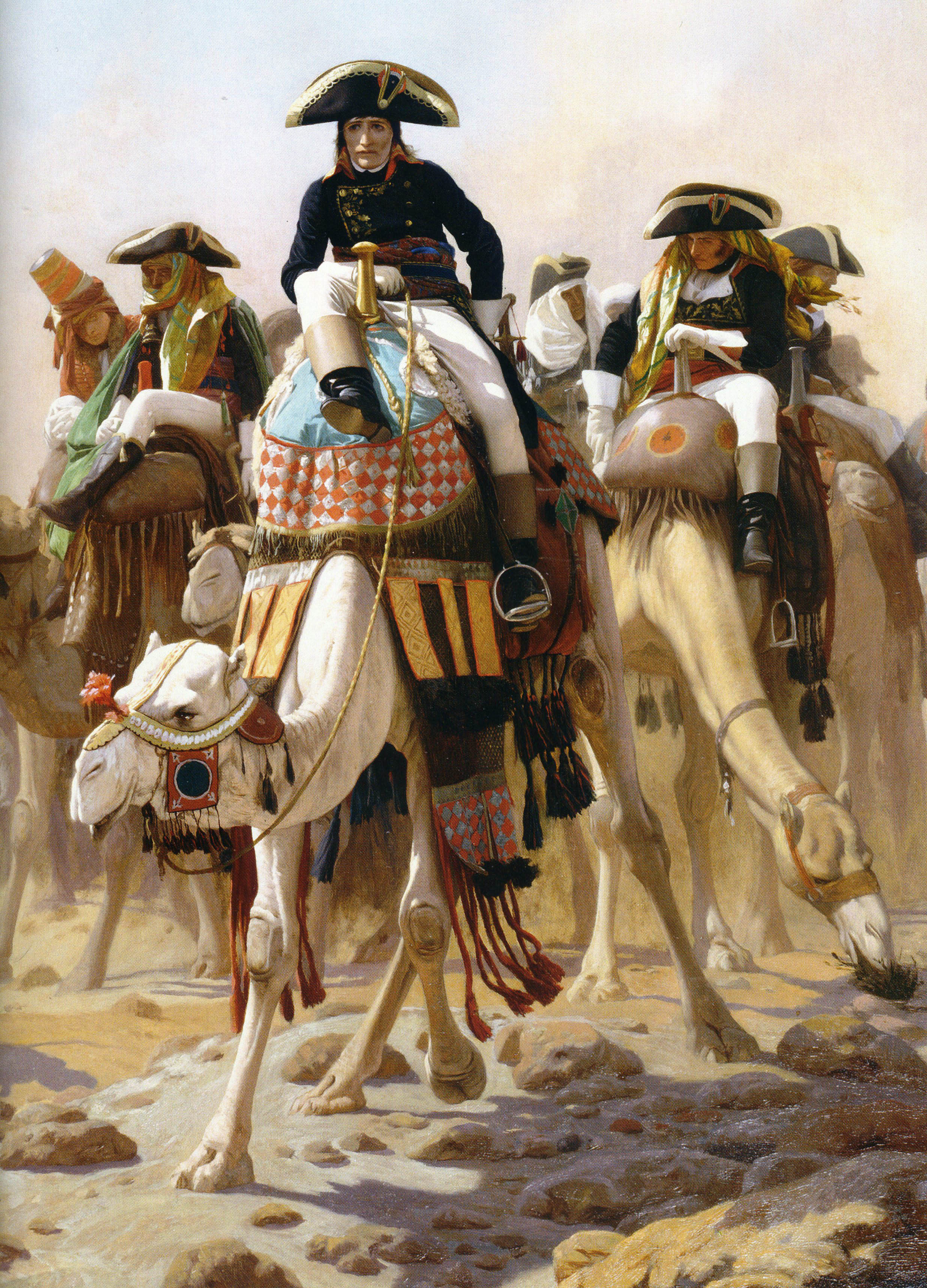 detail